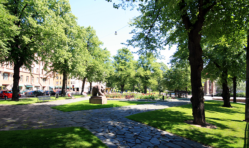 Karhupuisto, Kallio, Helsinki.